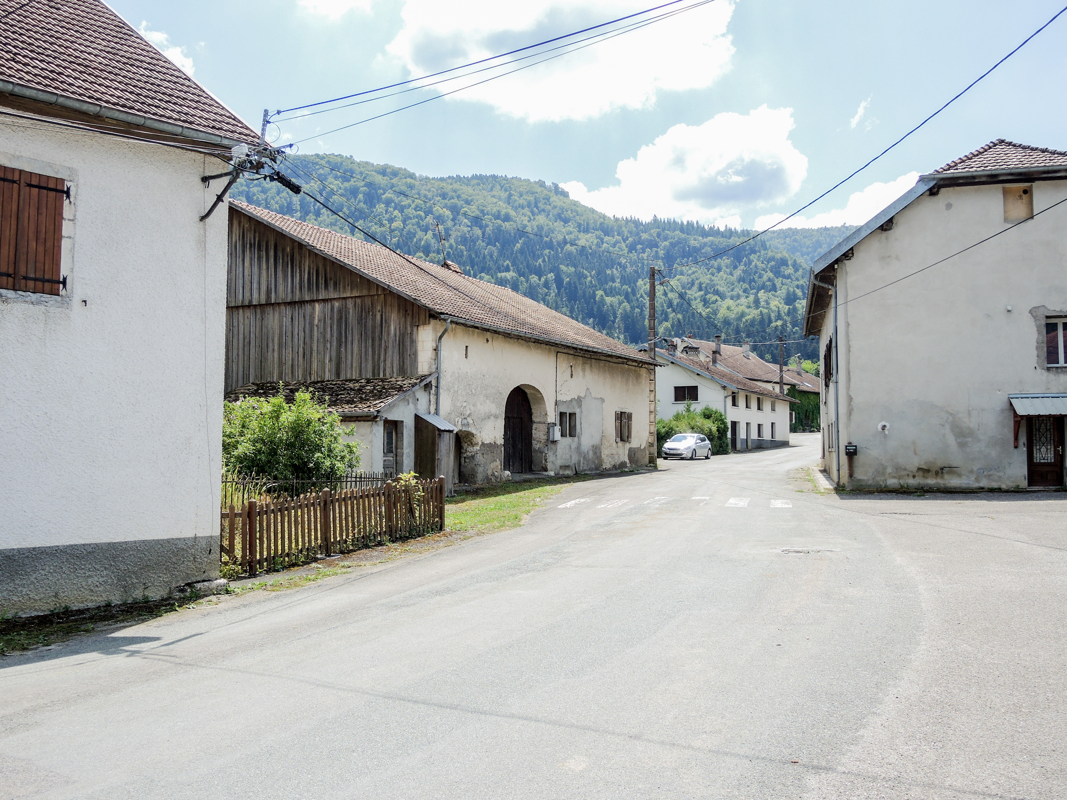 Centre du village de Brémoncourt. Montancy. Doubs